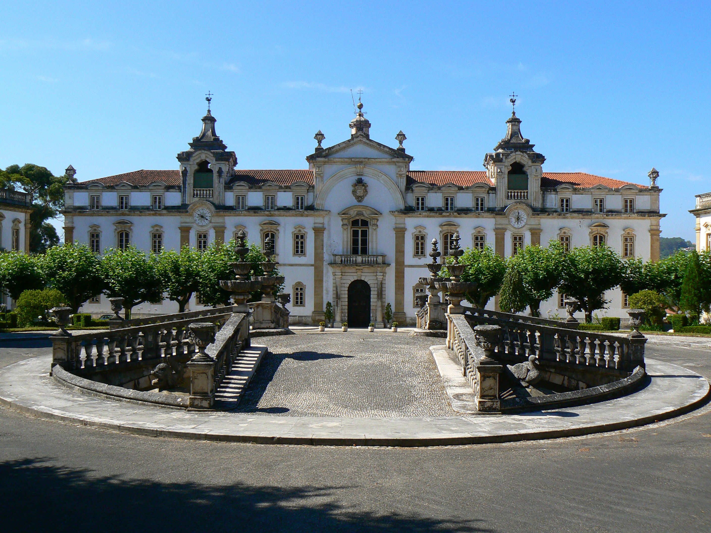 Edifício da autoria de Francesco Tanossi mandado construir pelo Bispo Miguel da Anunciação em 1748, na fachada destaca-se 4 janelas com balaustradas e a janela da varanda do coro da igreja, por cima desta um brazão com as armas dos Condes de Pavolide a quem o Bispo pertencia, duas torres coroadas com corochéu e sinos no interior.A entrada tem um portão em arco de ferro e bronze feito em Bolonha, duas colunas de fuste estriado que suporta a varanda. No interior tem uma bonita capela, destaque para a cúpula pintada por Pasquale Parente em 1760. Este cunjunto de 3 edifícios este o principal "Casa Velha 1748-1765", "Casa Nova 1873", "Casa Novíssima 1880" tem também uns belos jardins de influência barroca.